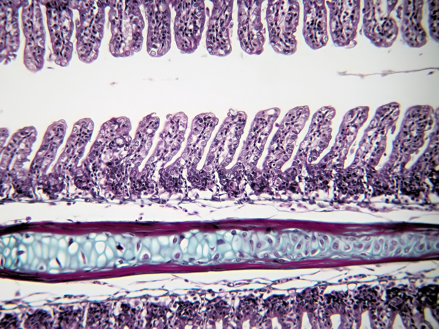 Branchies. Photo prise en afocal derrière un microscope.